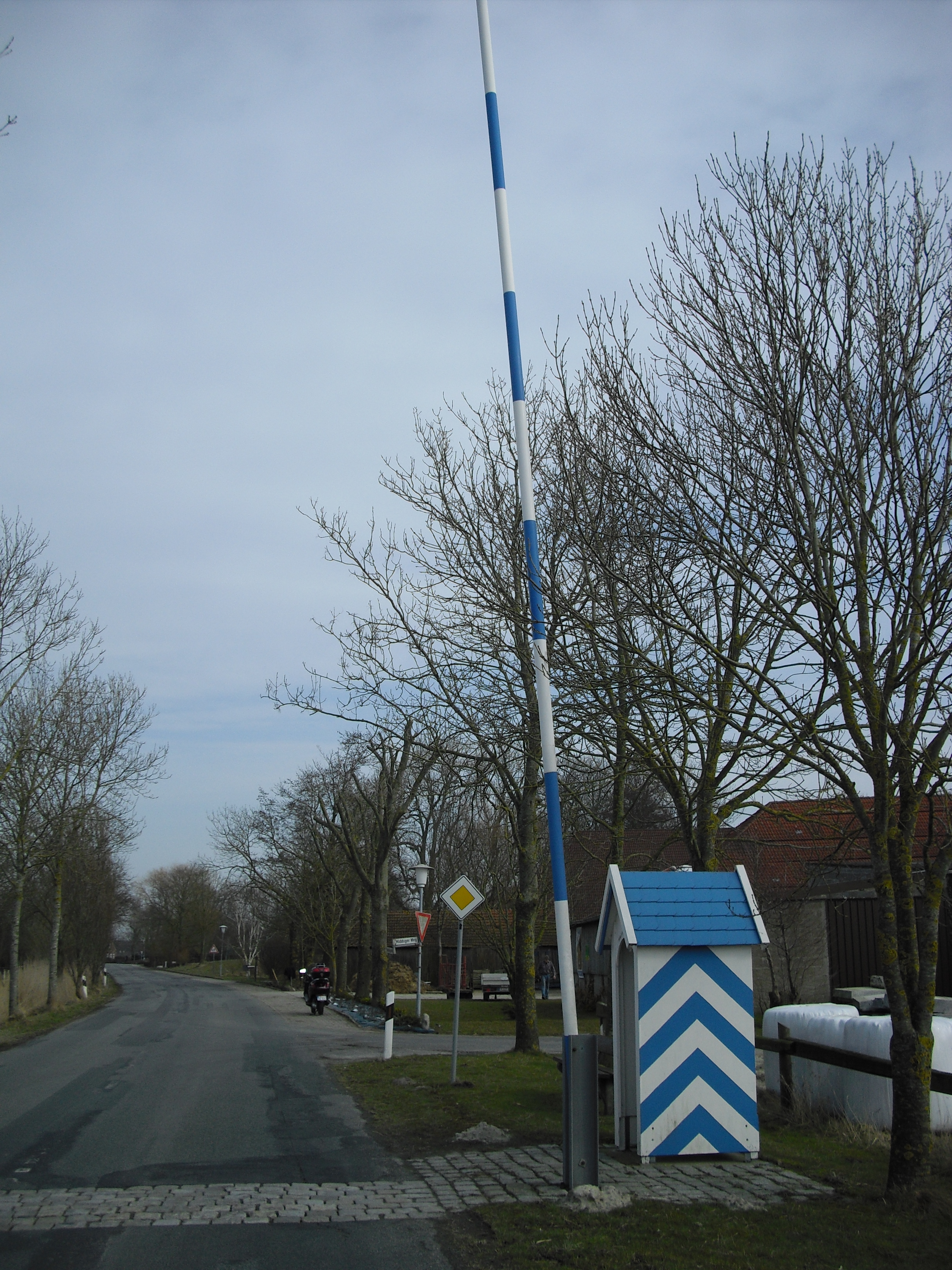 "Grenzübergang" Ostfriesland - Friesland (Ortseingang Middoge)